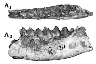 Hemimandible of tragulid ruminant Afrotragulus parvus (Withworth, 1958), Rusinga Island, late early Miocene of Kenya.